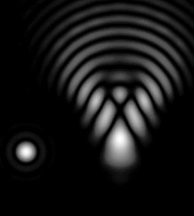 Auswirkung der Koma auf die Abbildung eines Sterns durch ein Fernrohr. Links: fehlerfreie Abbildung des Beugungsscheibchens. Rechts: starke Koma.